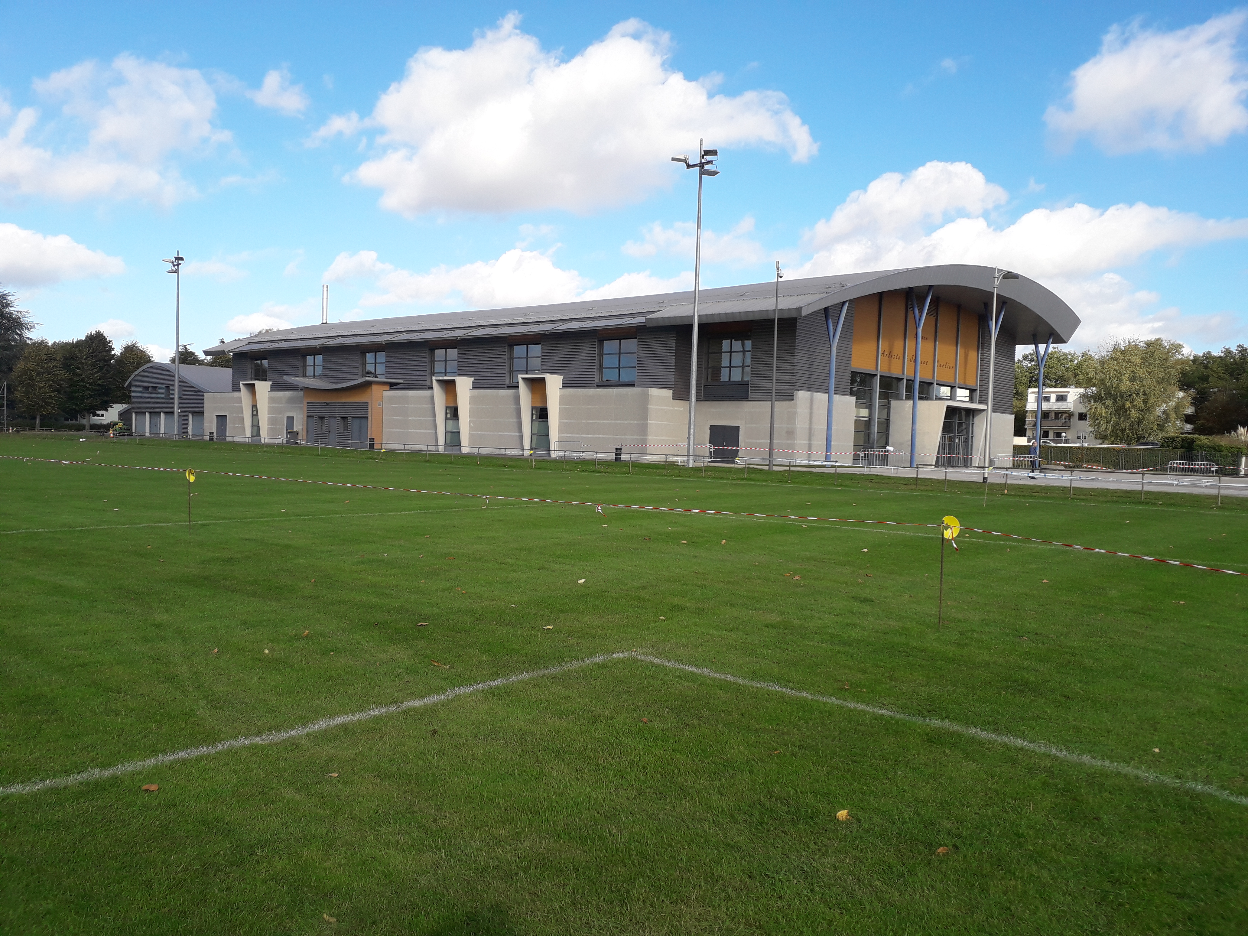 L'espace Arlette-et-Jacques-Carlier, l'un des bâtiments du centre sportif Louison-Bobet, au Plessis-Trévise, dans le Val-de-Marne, en France.